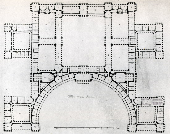 Starov plan: умовний план училища